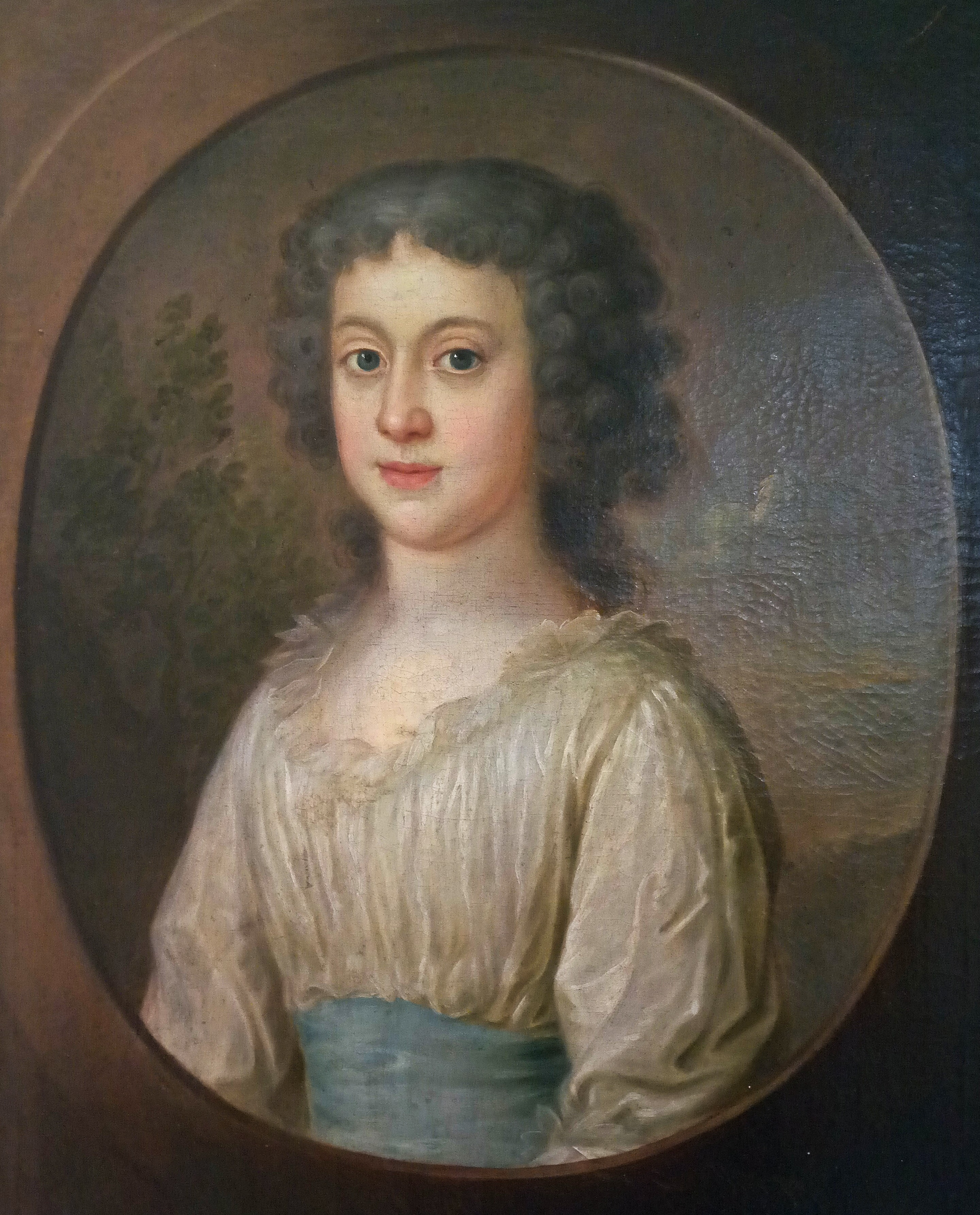 Prinzessin Henriette von Nassau Weilburg, gemalt von Johann Schlesinger, Stadtmuseum Grünstadt, um 1805